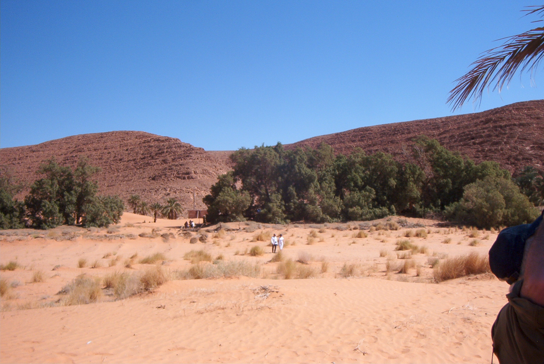 Paysage du Sahara, Sebseb